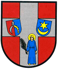 Herb miasteczka Zawałów